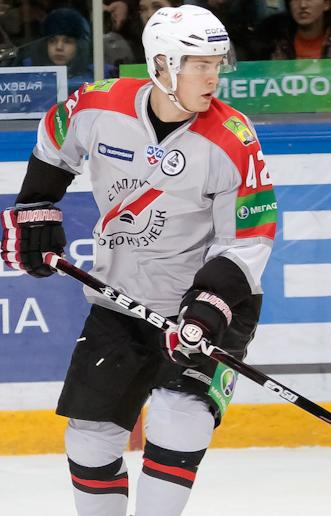 Защитник новокузнецкого «Металлурга» Захар Арзамасцев во время матча чемпионата КХЛ против хабаровского «Амура» 6 февраля 2012 года.